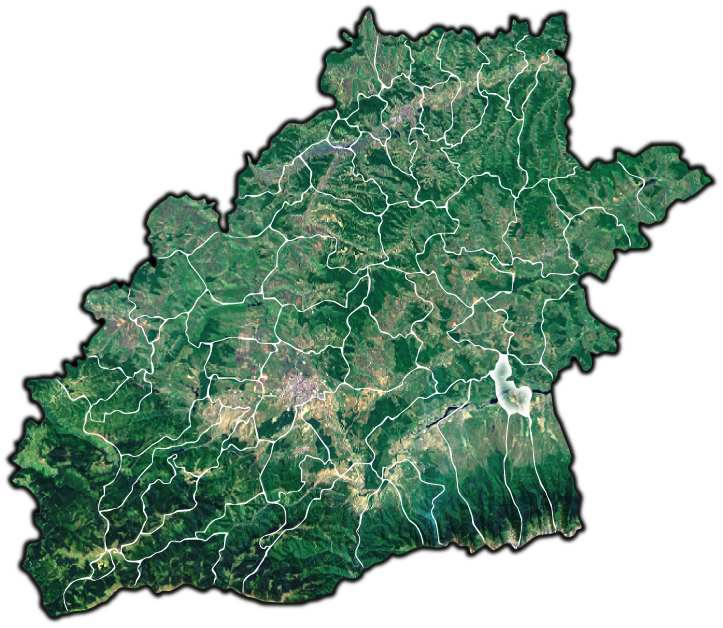 Carta jud Sibiu.